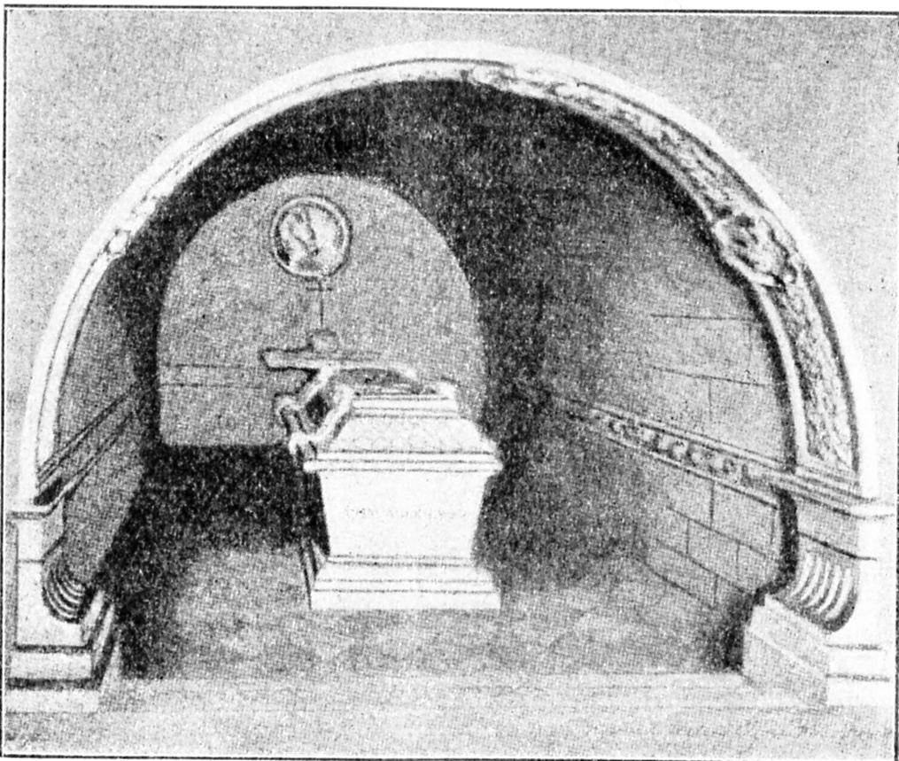 Katedra Wawelska: grób Adama Mickiewicza Fotografia z „Przewodnika po Katedrze Wawelskiej” (tekst pióra Lucjana Rydla) wydanego w Krakowie w 1913 roku. Wydrukowano 200 numerowanych egzemplarzy tego przewodnika, który sprzedawany był po 50 halerzy. Dochód ze sprzedaży złożony został do dyspozycji Księcia Biskupa Krakowskiego.